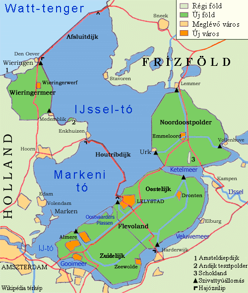 Zuiderzeewerken